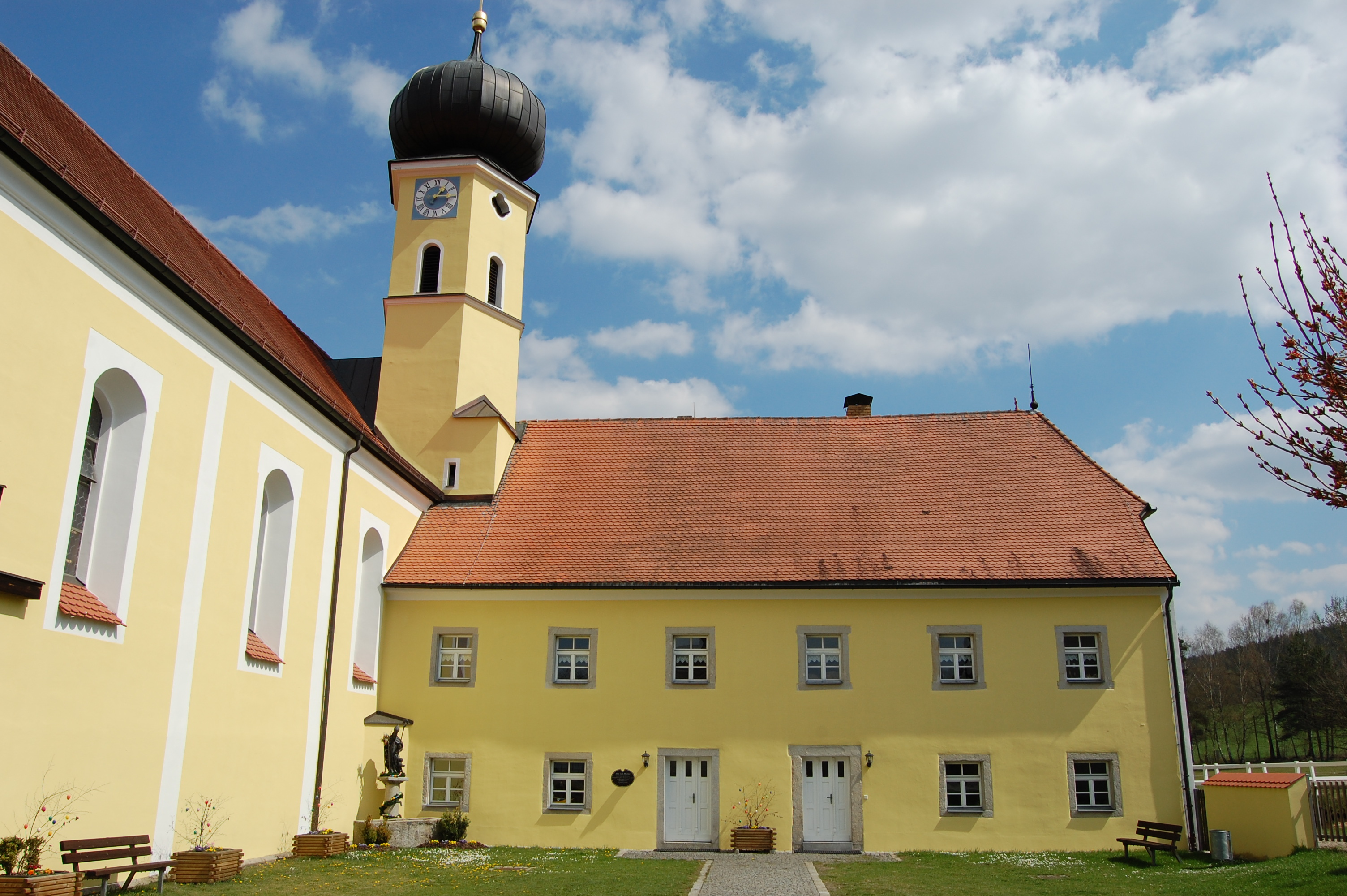 Böhmischbruck, Alter katholischer Pfarrhof, mit der Kirche um 1250 erbaut, wiederholt umgebaut und erweitert (2011)